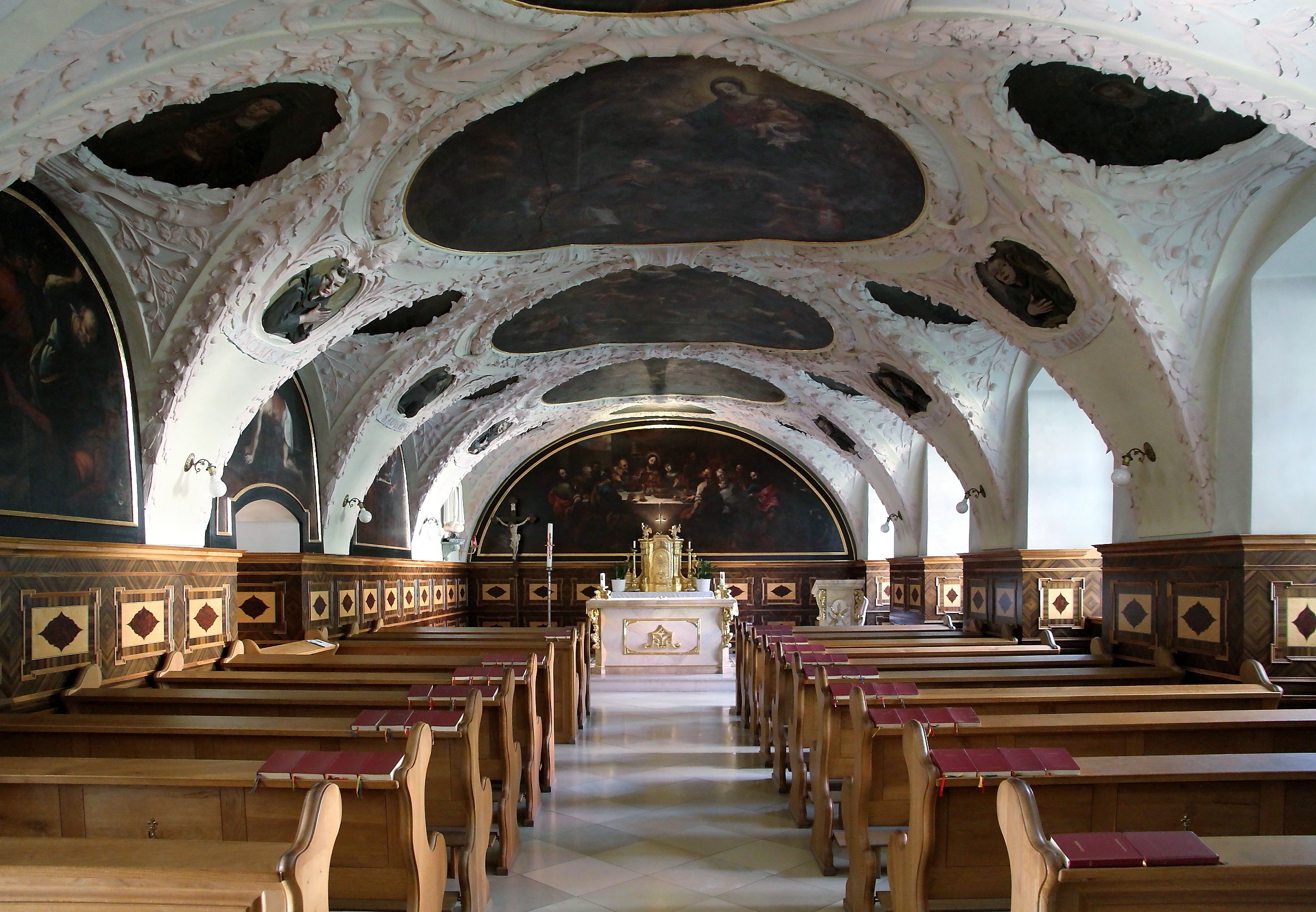 Die Kapelle des Franziskanerklosters in der burgenländischen Stadt Frauenkirchen.